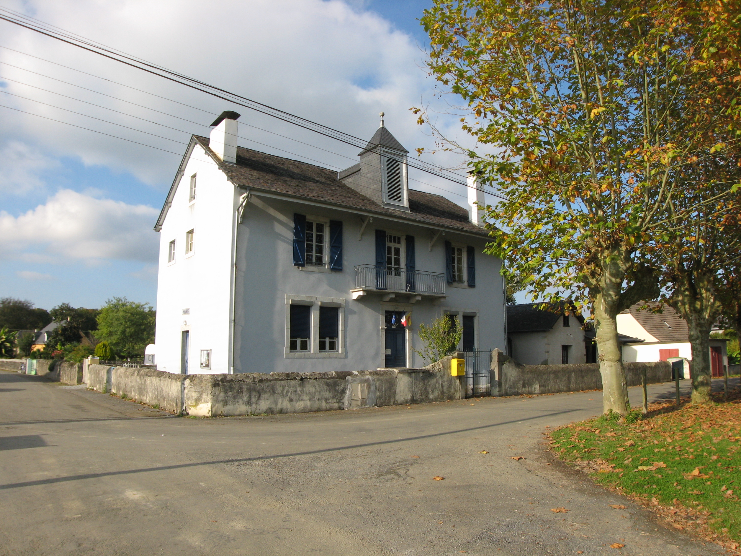 Mairie de Poey-d'Oloron (Pyrénées Atlantiques) Pyrénées).